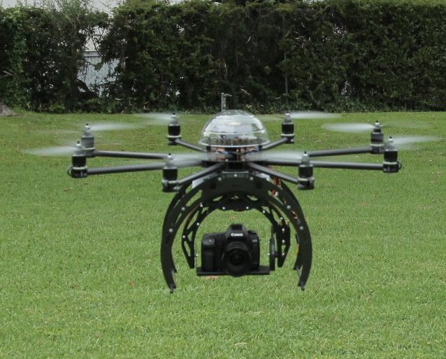 Ce drone permet d'emporter une camera ou un appareil photo haute définition pour réaliser des prises de vues aériennes.